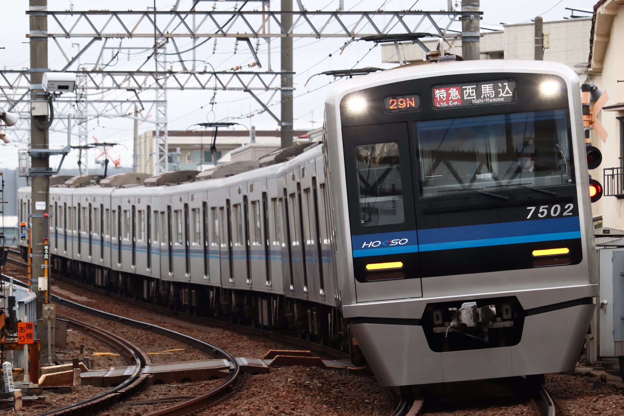 京成押上線で特急で運行する北総7500形電車(7502編成)